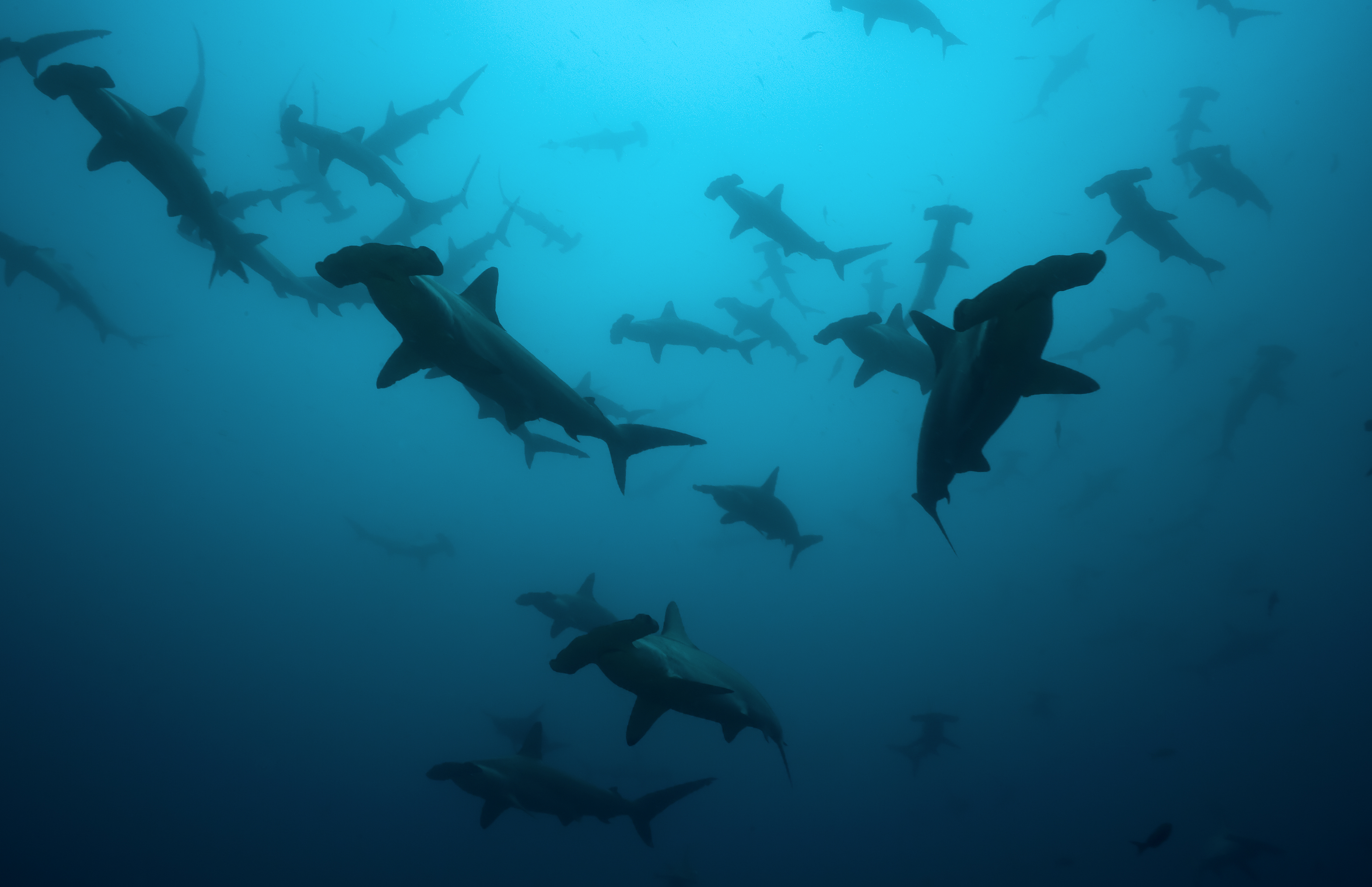 Стая молотоголовых акул возле острова Кокос (Коста-Рика)